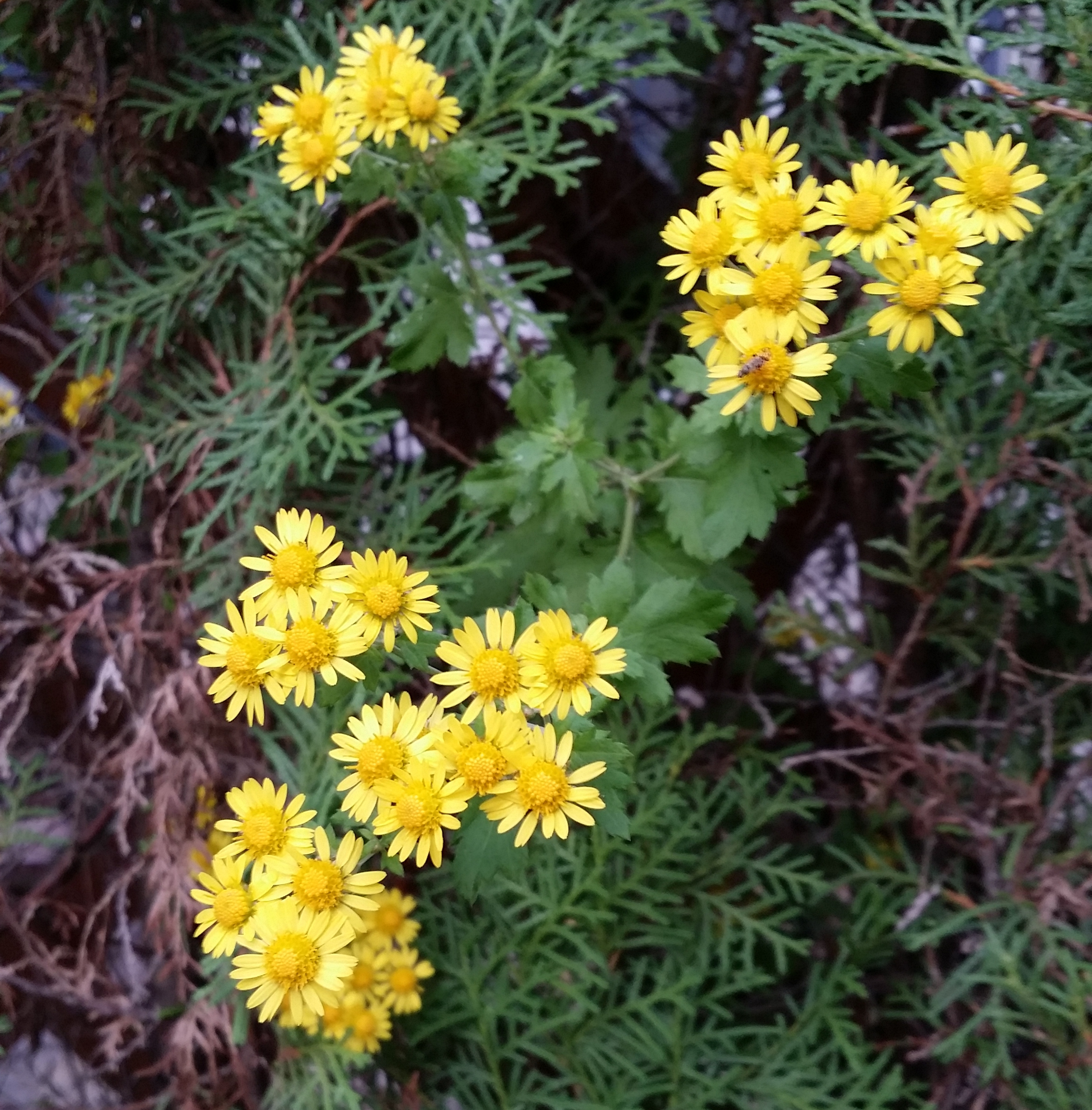 산국(Chrysanthemum boreale)